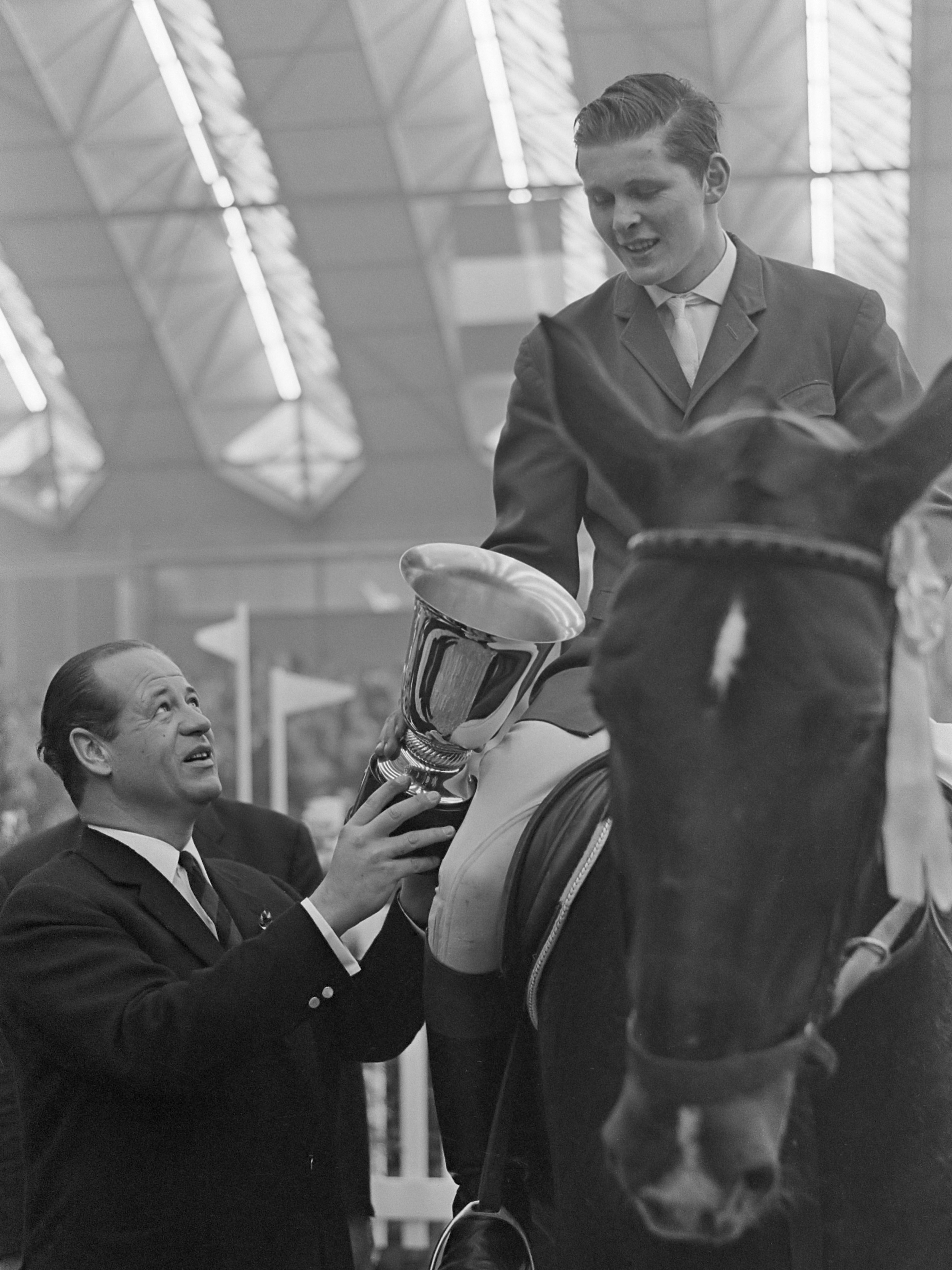 Jumping Amsterdam 1965 in de RAI te Amsterdam. De heer Heineken terwijl hij beker aan Wiltfang overhandigt 24 oktober 1965